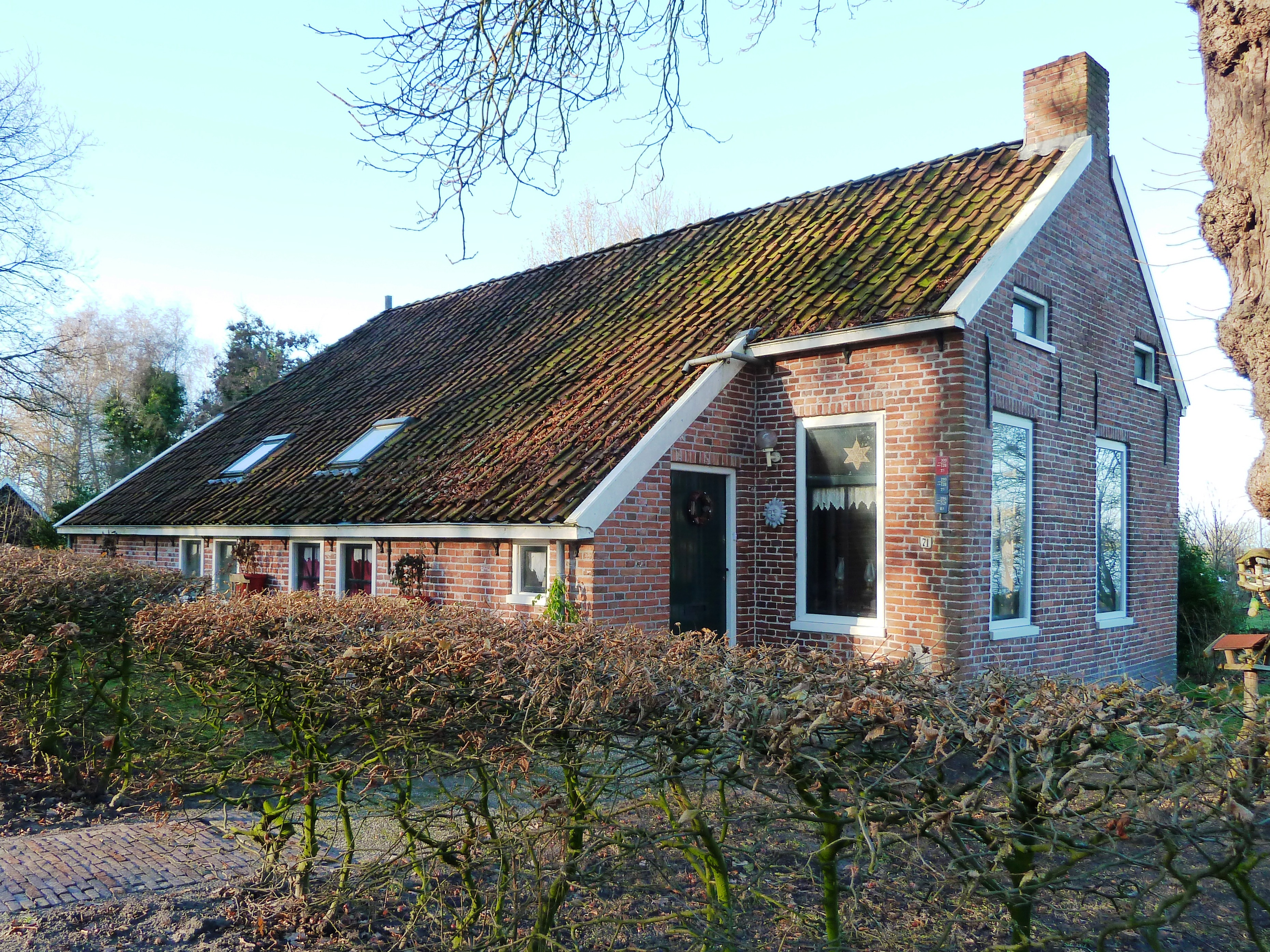 Keuterij met ondiep woongedeelte aan de Hoofdweg 71 van Midwolda (Groningen, Nederland).